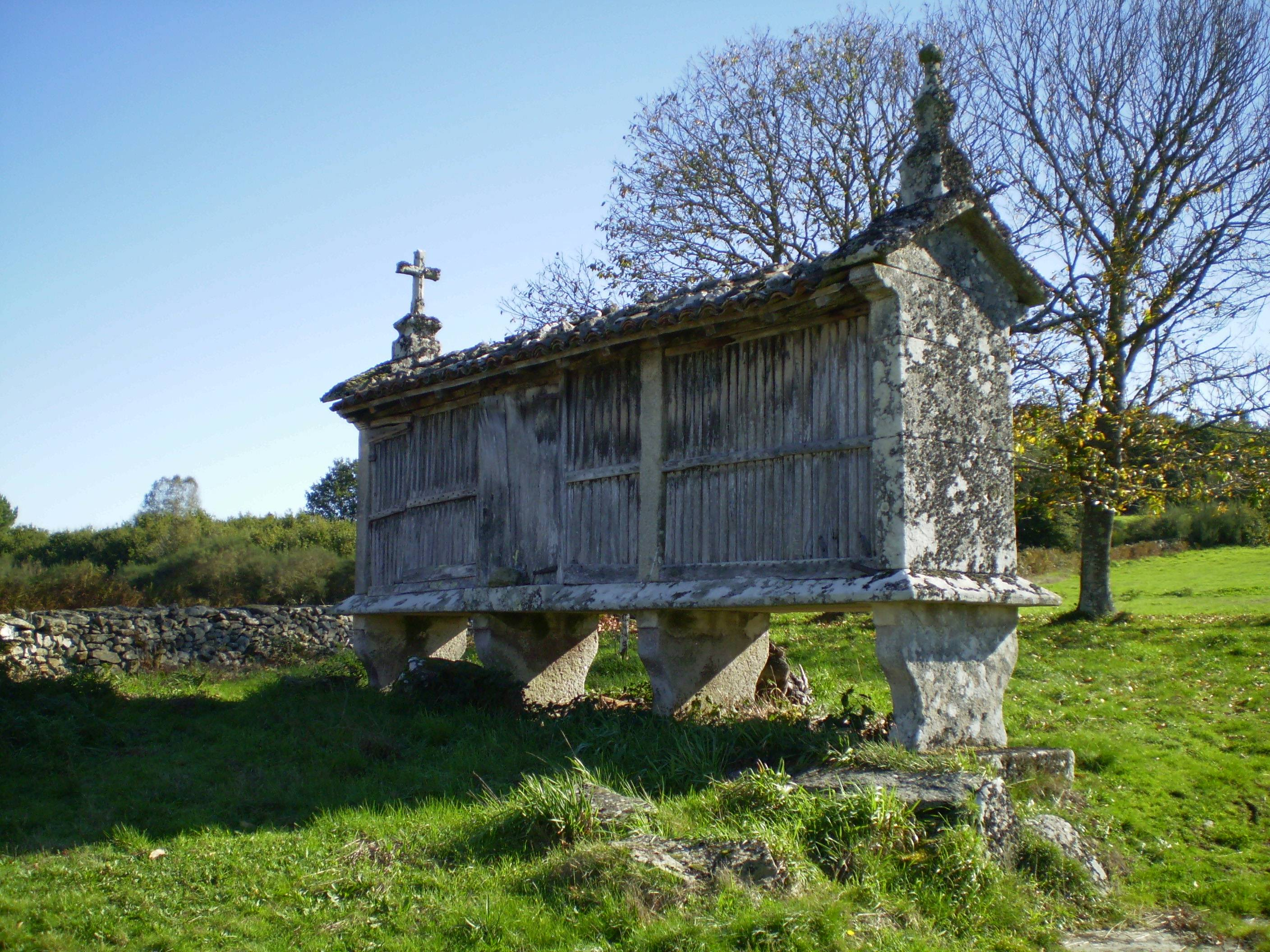 Hórreo de tipo mahía, de tres claros, sobre leve soleira e catro cepas copiformes. Porta lateral, cuberta de tella do país e remates en cruz latina e Lampión fusiforme. Ubicado no lugar de Casteda (Antas de Ulla)